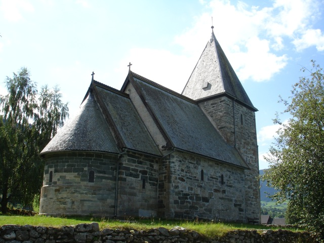 Bilete Hove steinkyrkje